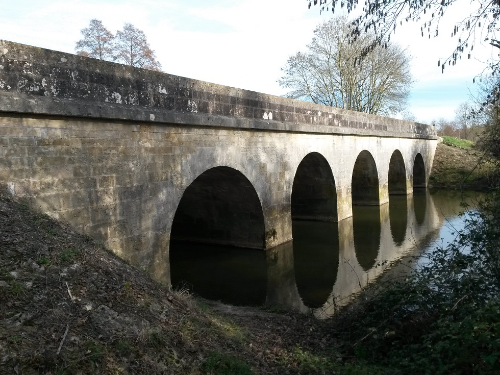 Pont-Charrault sur le Grand Lay dans la commune de Chantonnay (Saint-Philbert-du-Pont-Charrault)